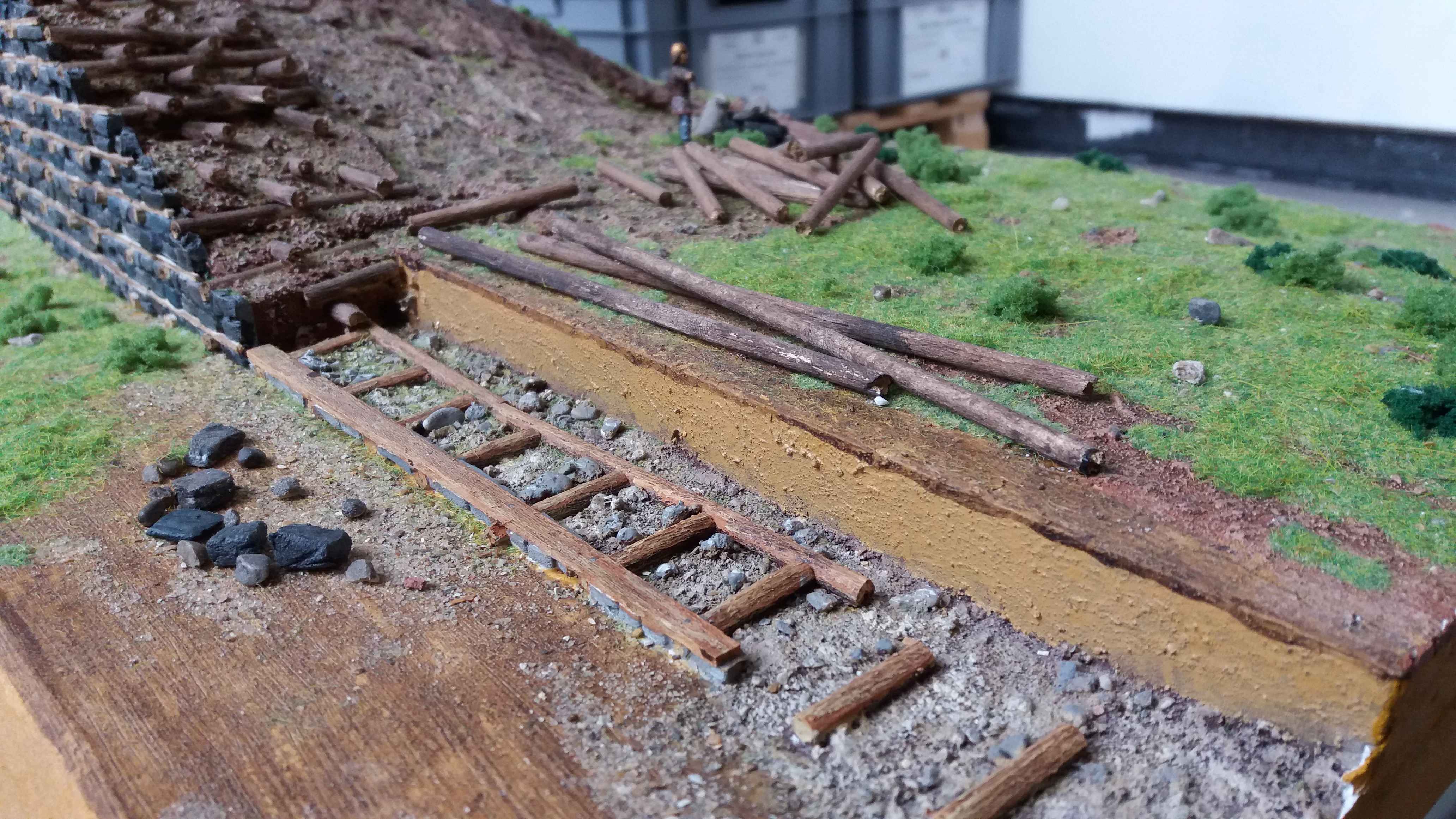 Maquette de Nicolas Hirsch exposée au Service Archéologique de la Ville de Lyon : détail de la structure.